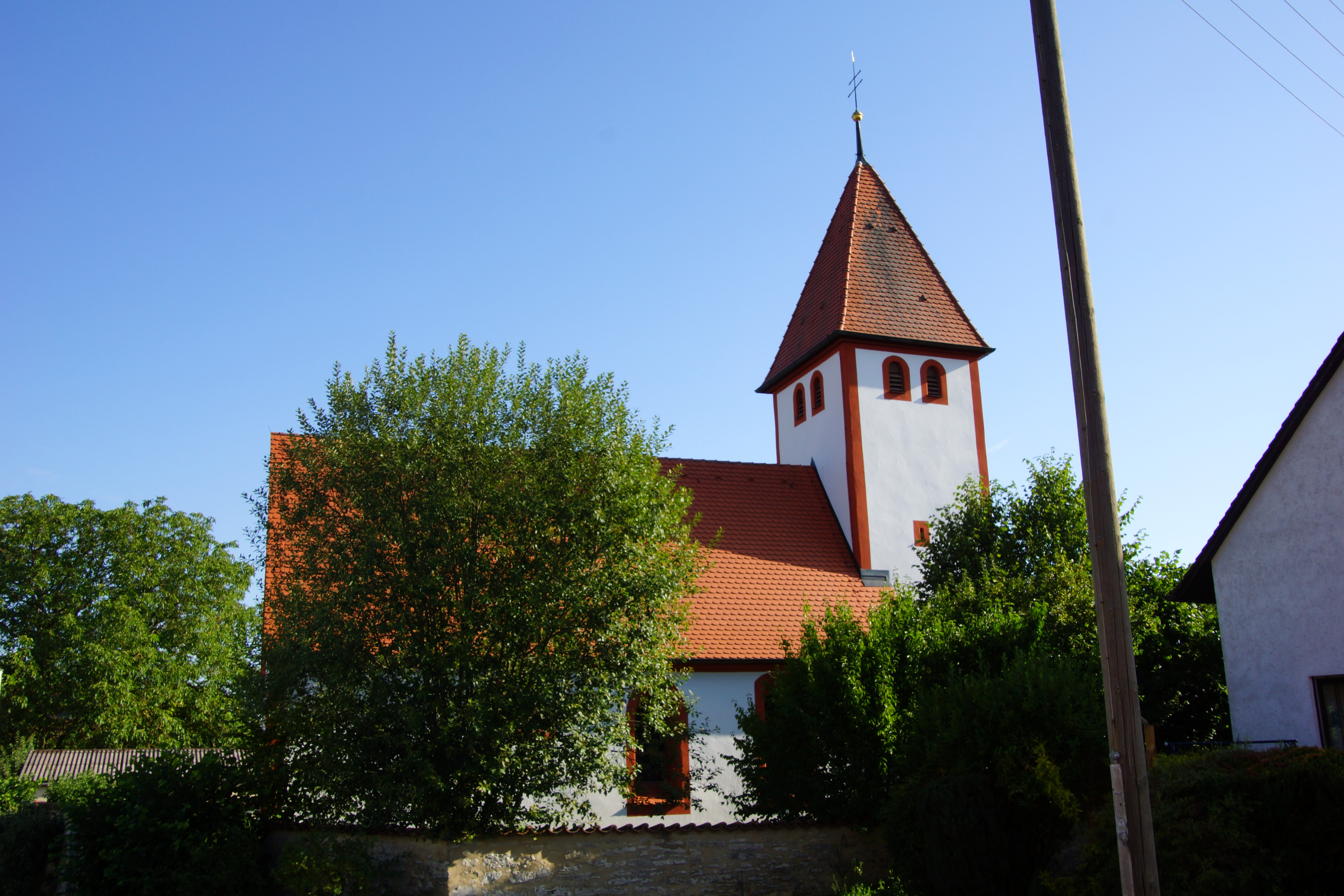 Die katholische Filialkirche St. Margaretha im Juraort Wattenberg bei Berching